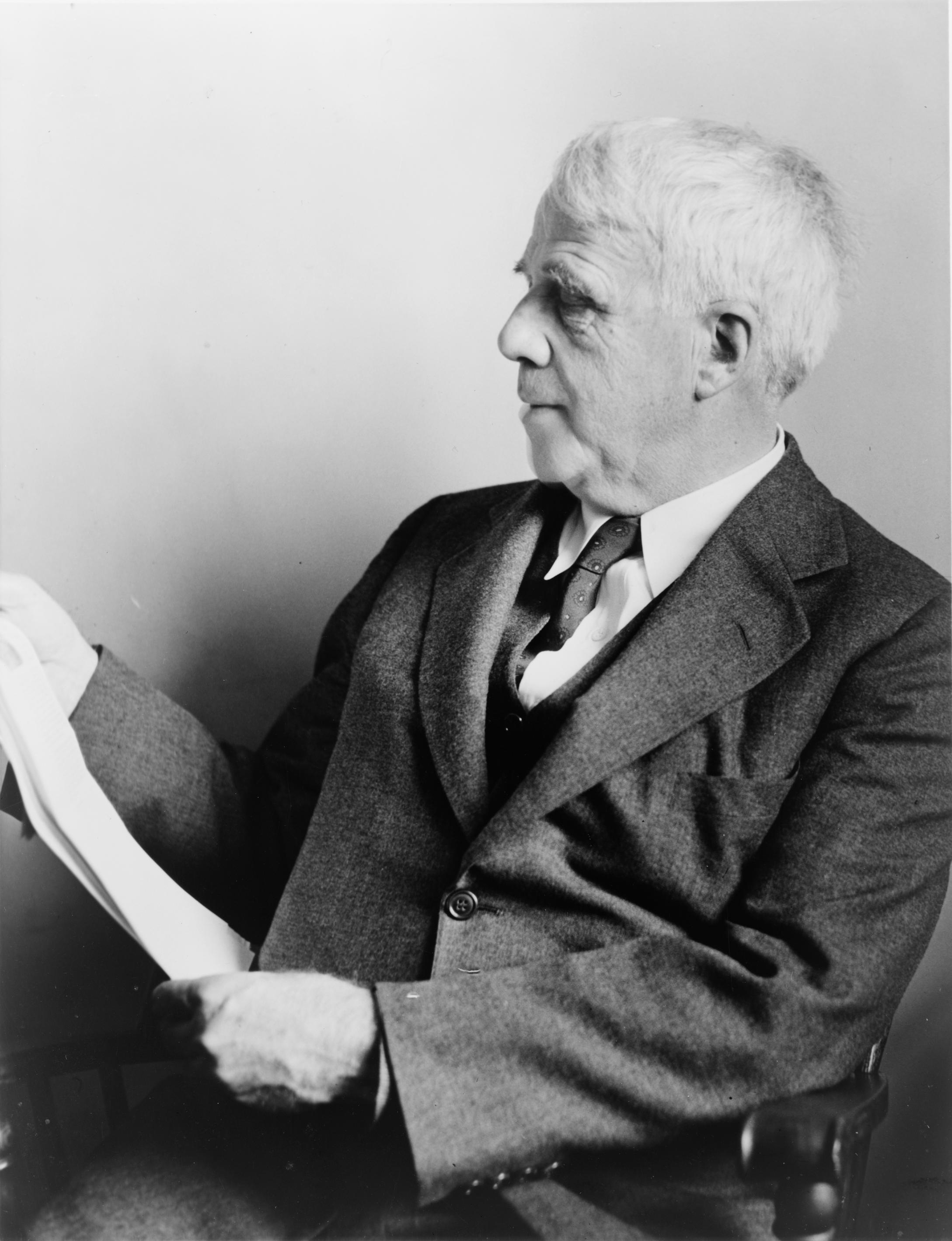 Robert Frost, American poet